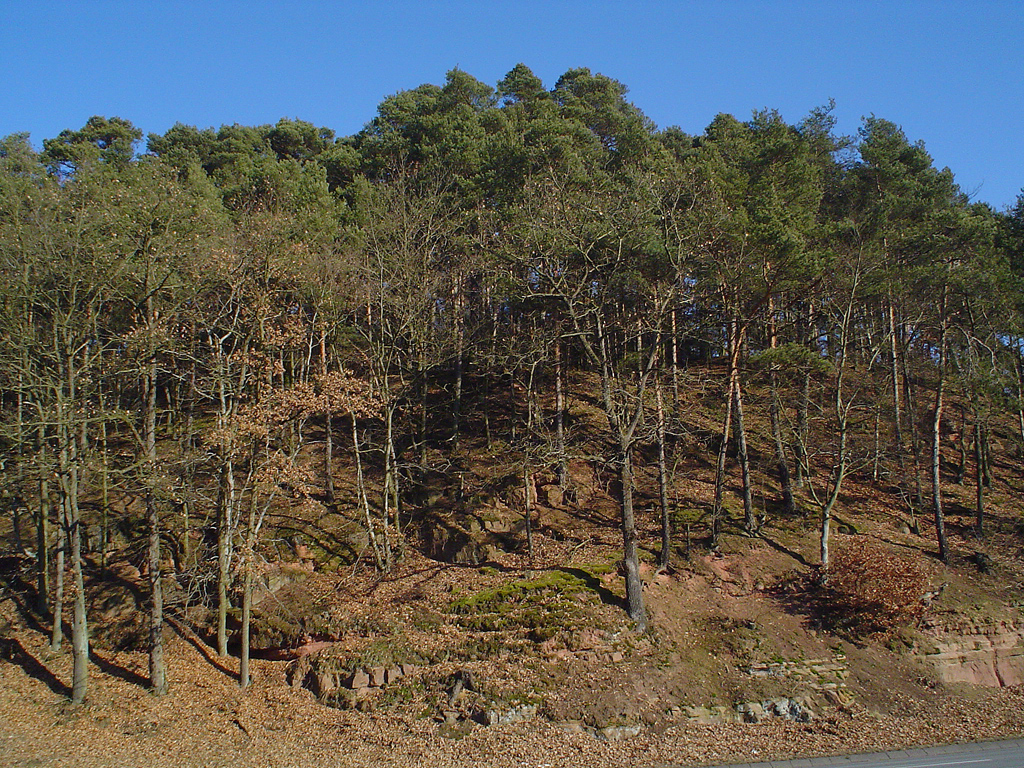 Typische Waldvegetation auf den Lahnbergen. Fichtenwald auf Buntsandstein